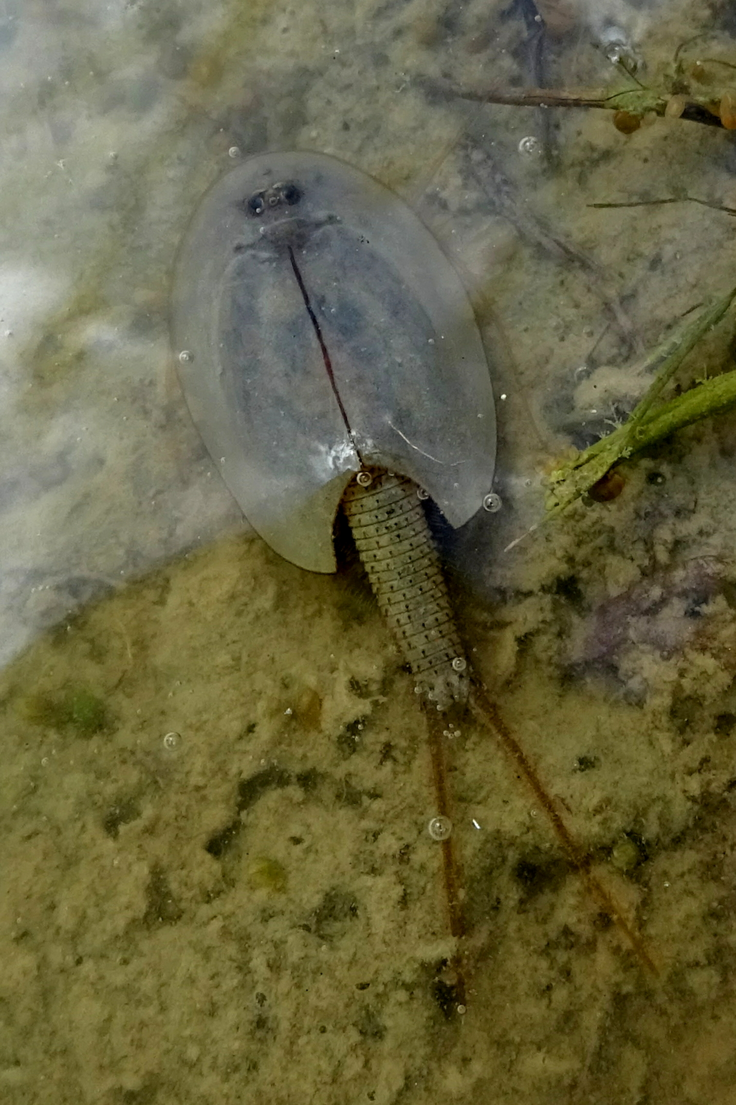 Ein Kiemenfußkrebs der Gattung Triops (Triops sp.) im Naturschutzgebiet „Lange Dreisch–Osterberg“ (NSG HA 218) in Niedersachsen